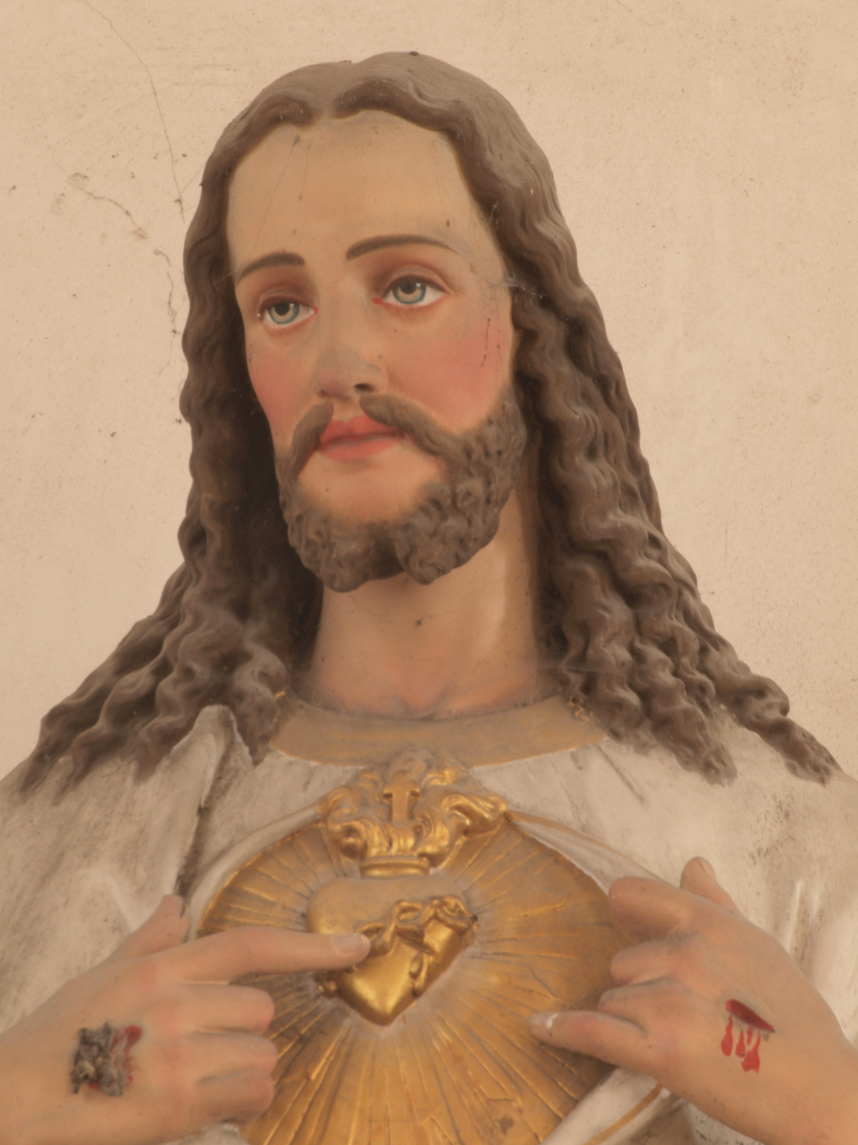 Villemanoche ; l'intérieur de l'église.